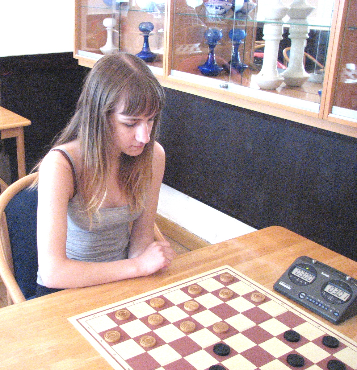 Elvia Sõber mängimas Eesti välkkabe meistrivõistlustel